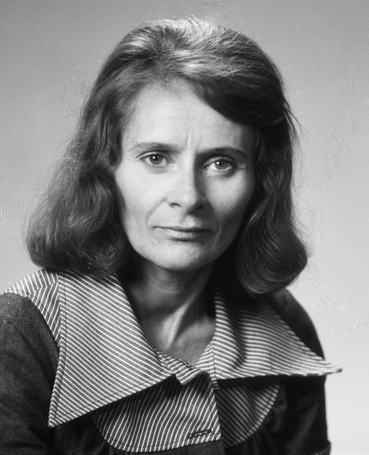 portrett, kvinne, forfatter, brystbilde.